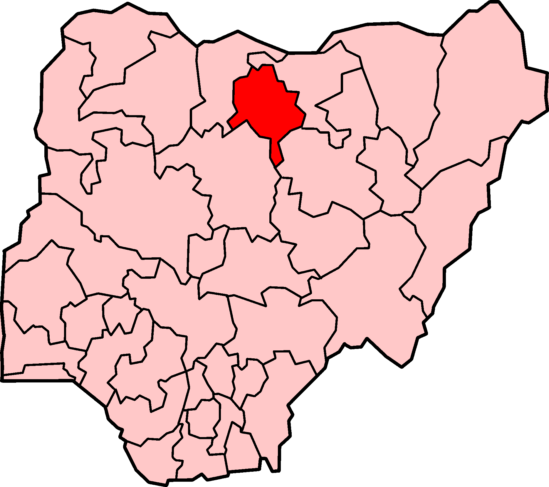 Localização do estado de Kano na Nigéria.